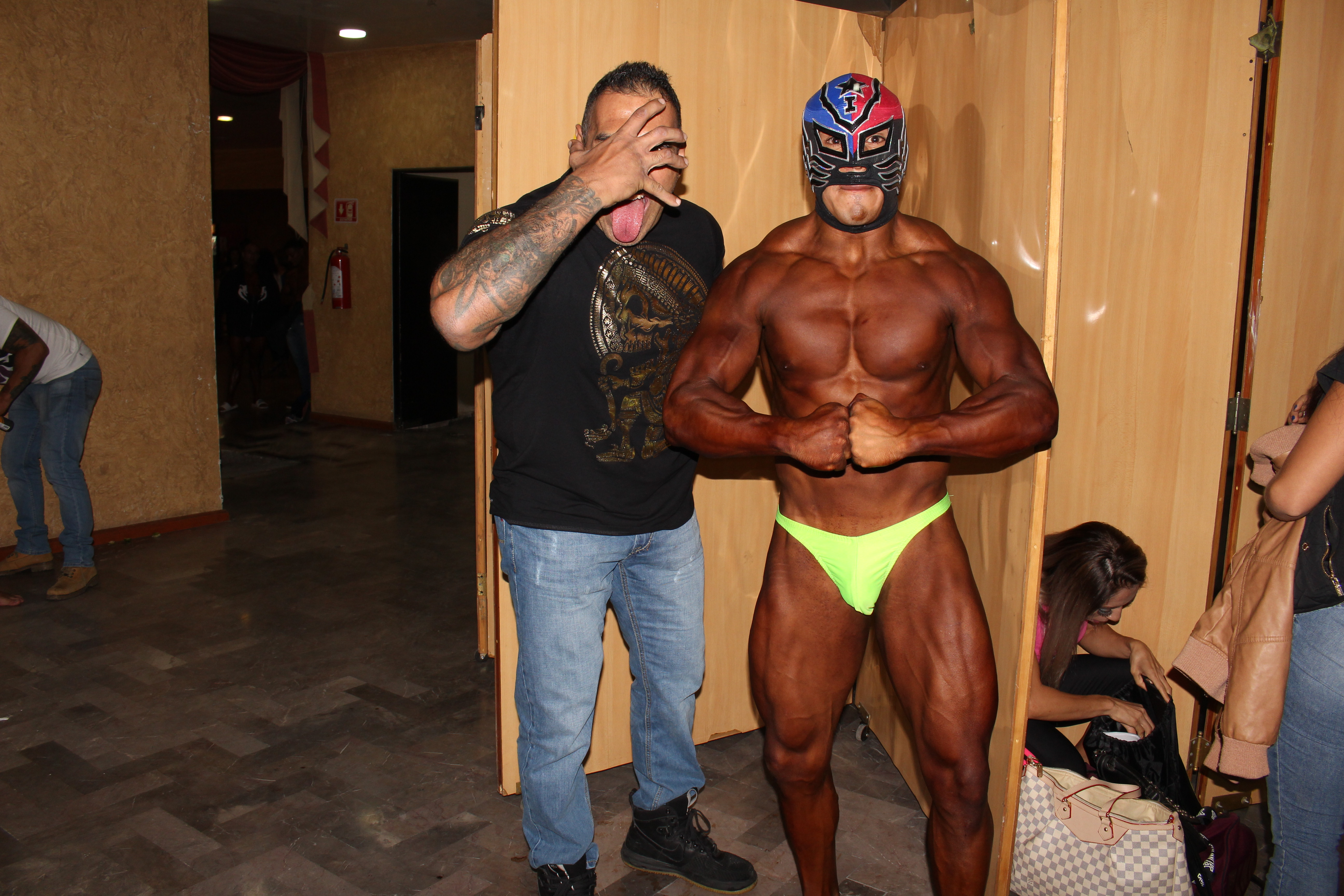 Fotografía durante el Mr y Miss Ferrocarrilero 2018